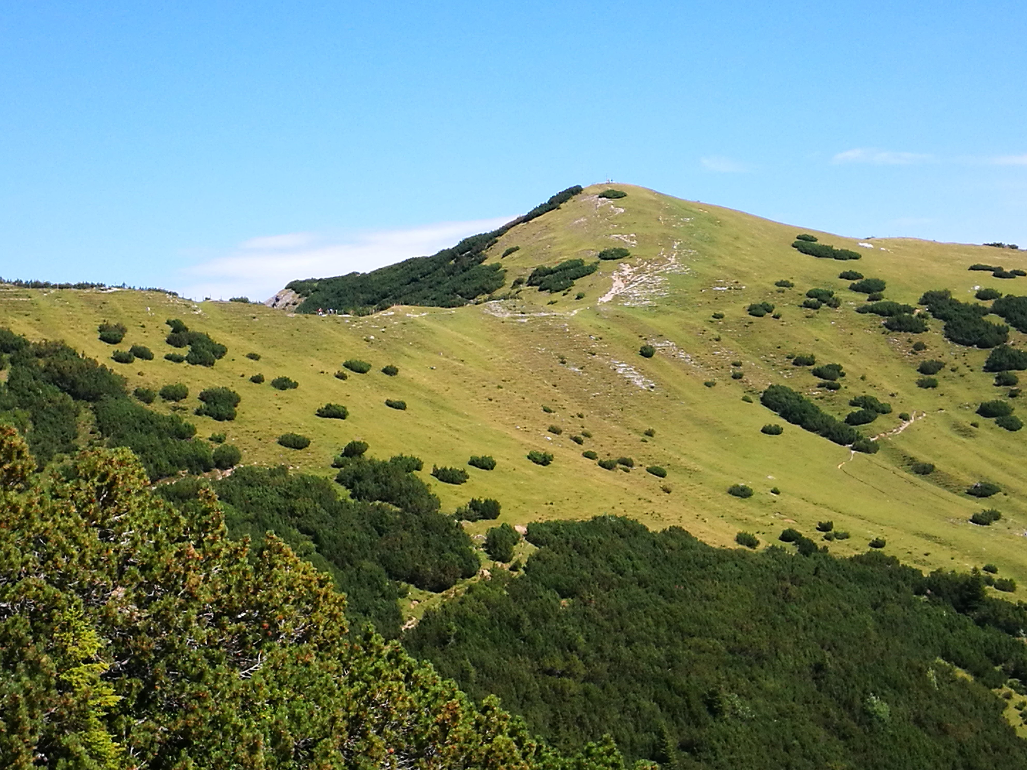 Der Schönberg vom Osthang des Stachlerkopfs aus gesehen